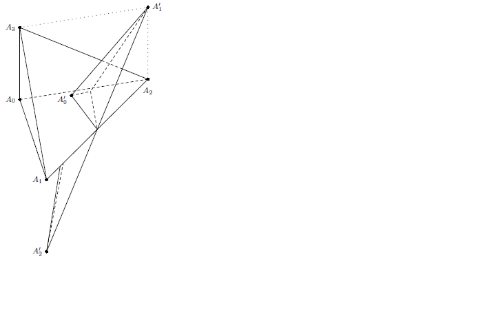 Paire de tétraèdres de Möbius